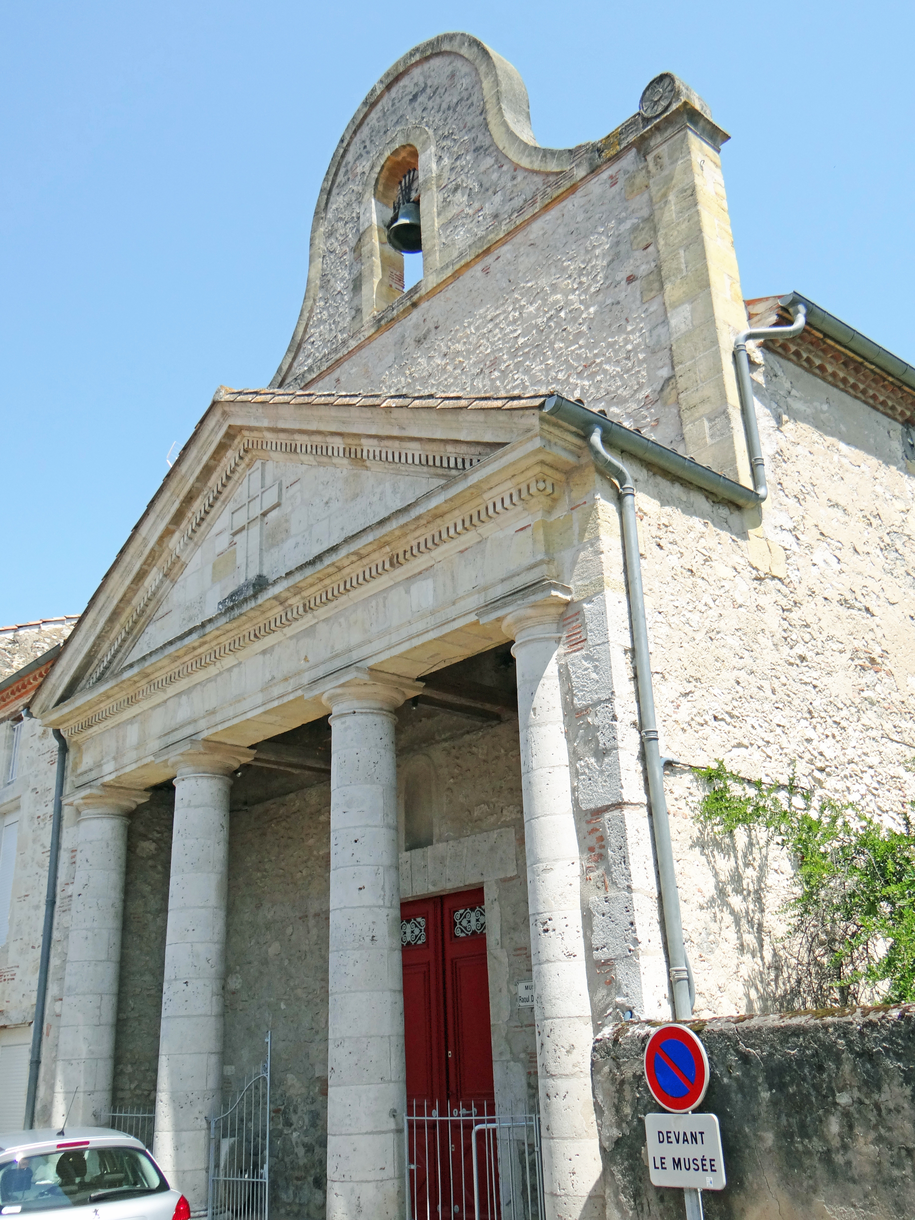 Aiguillon - Musée Raoul-Dastrac - Façade de l'ancienne église Saint-Félix datant du XVIIIe siècle remontée devant la chapelle Notre-Dame du Lot